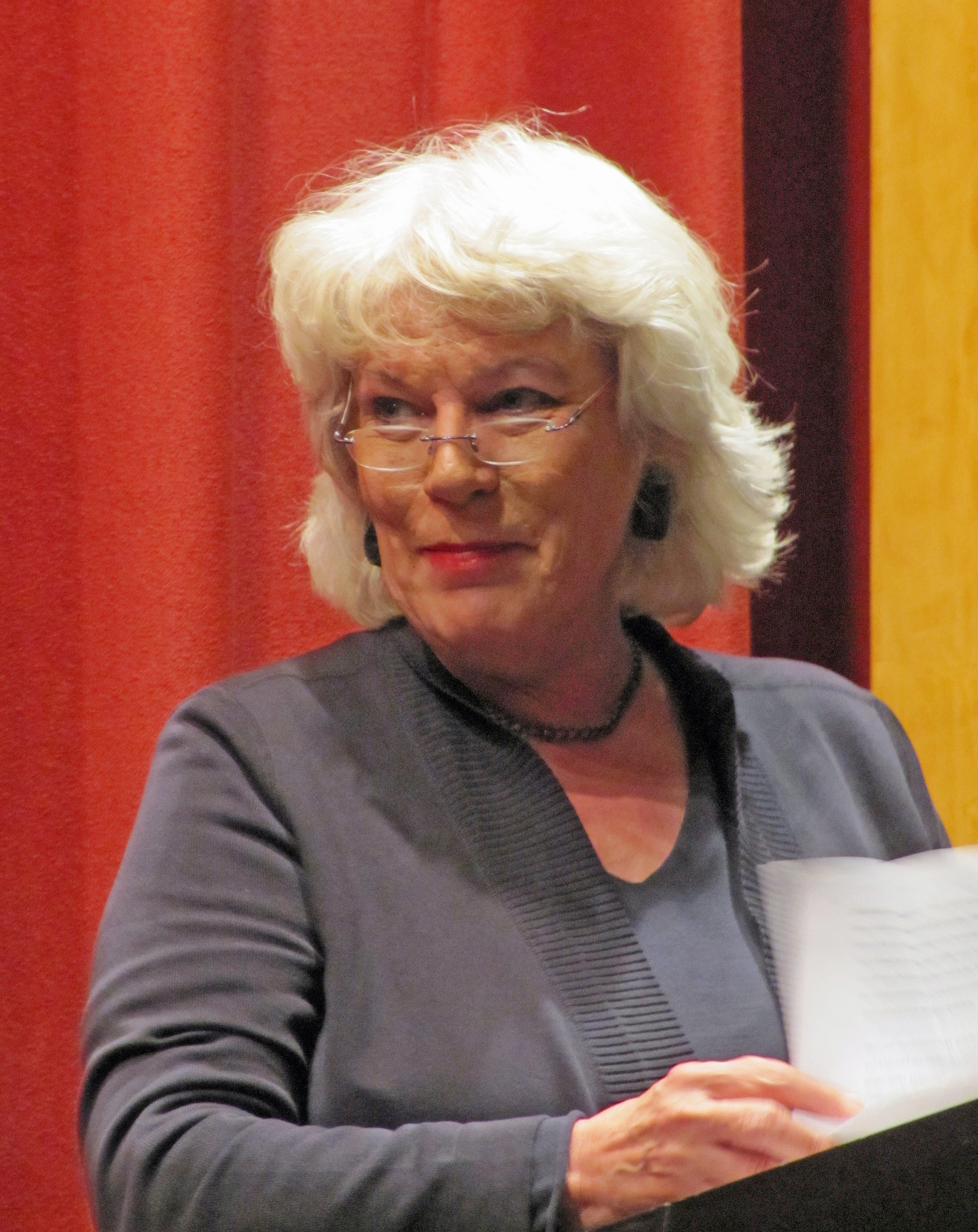 Jutta Ebeling, Bündnis 90/Die Gruenen, 2010 in Ffm.